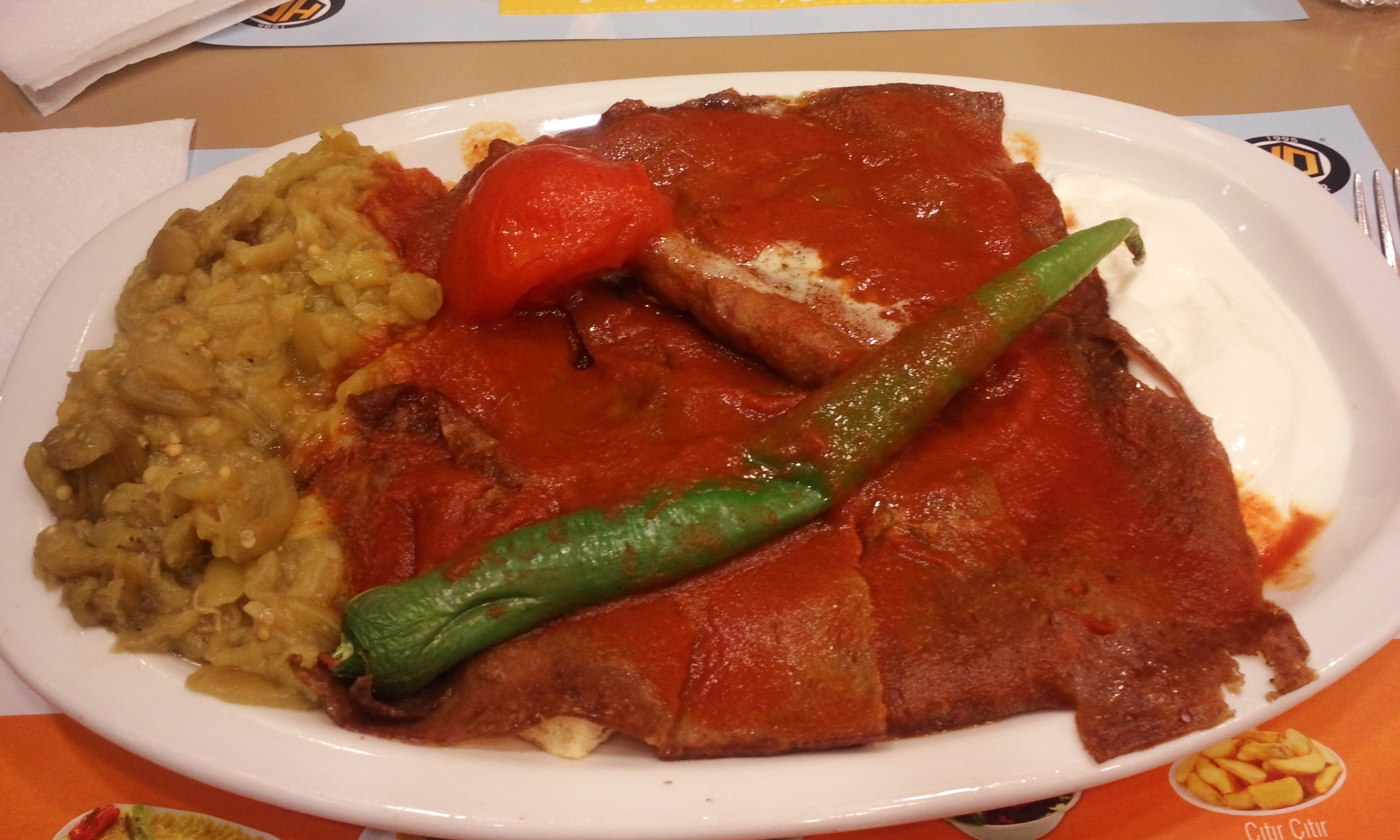 2015년 1월 28일 터키 앙카라에서 찍은 이스켄데르 케밥